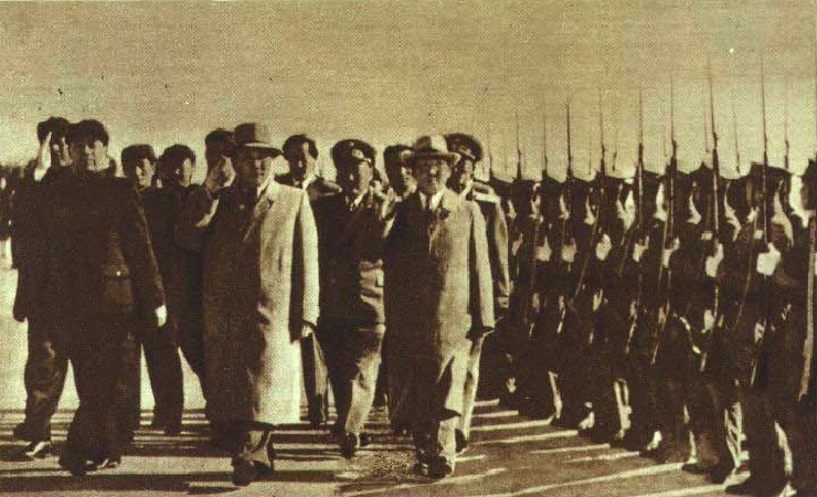 1952年9月28日蒙古国总理泽登巴尔访问中国 周恩来 泽登巴尔 拉姆苏伦 Монгол: 1952 онд Бээжинд хүрэлцэн ирсэн Юмжаагийн Цэдэнбал